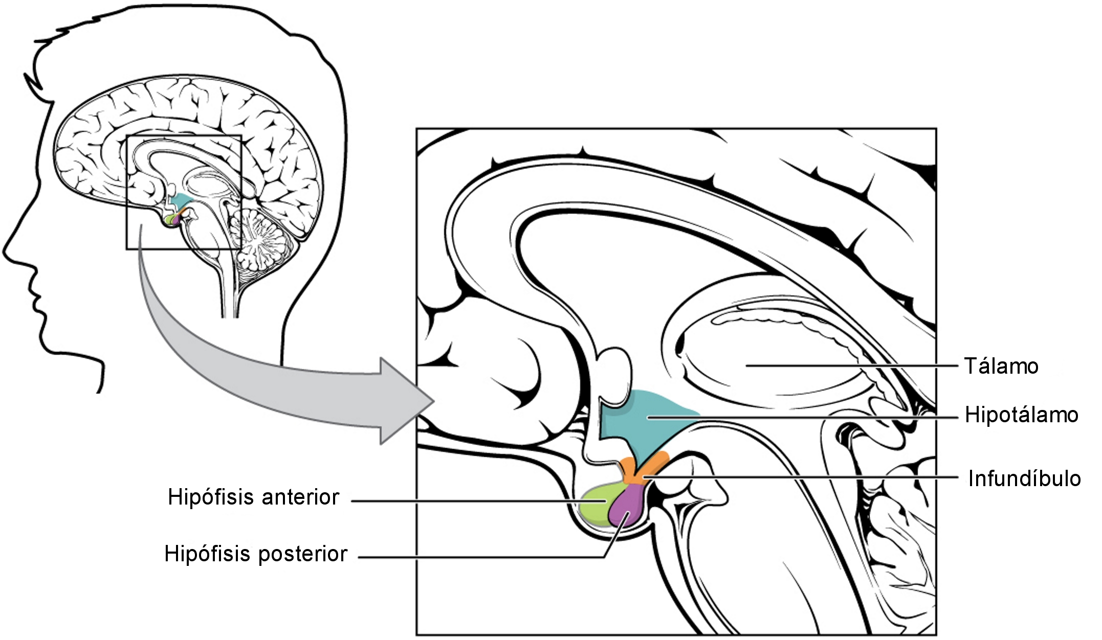 Representación esquematica del hipotálamo y su relación con la hipófisis a través del infundíbulo.